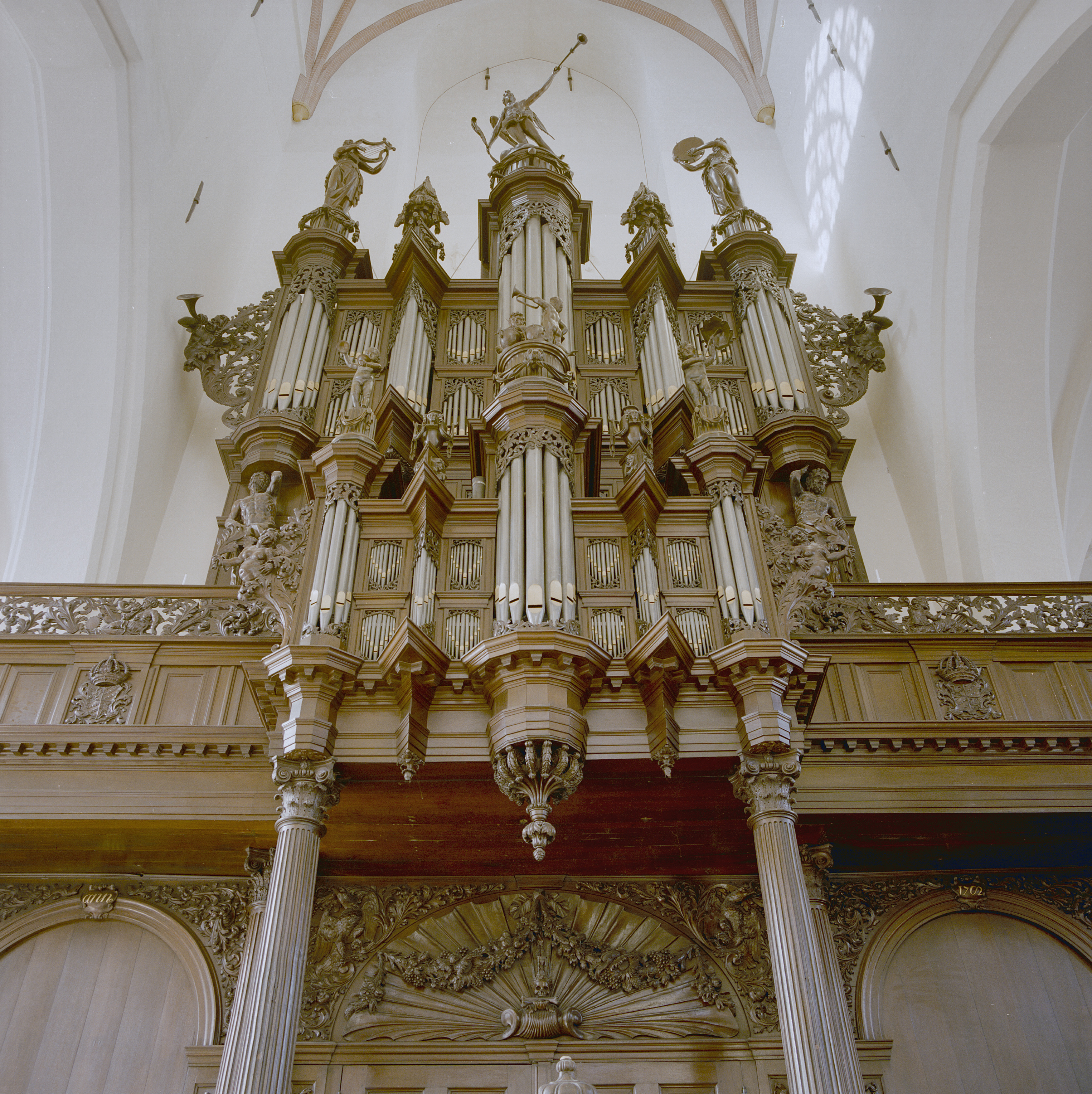 Der Aa-kerk: INTERIEUR, GROTE ORGEL